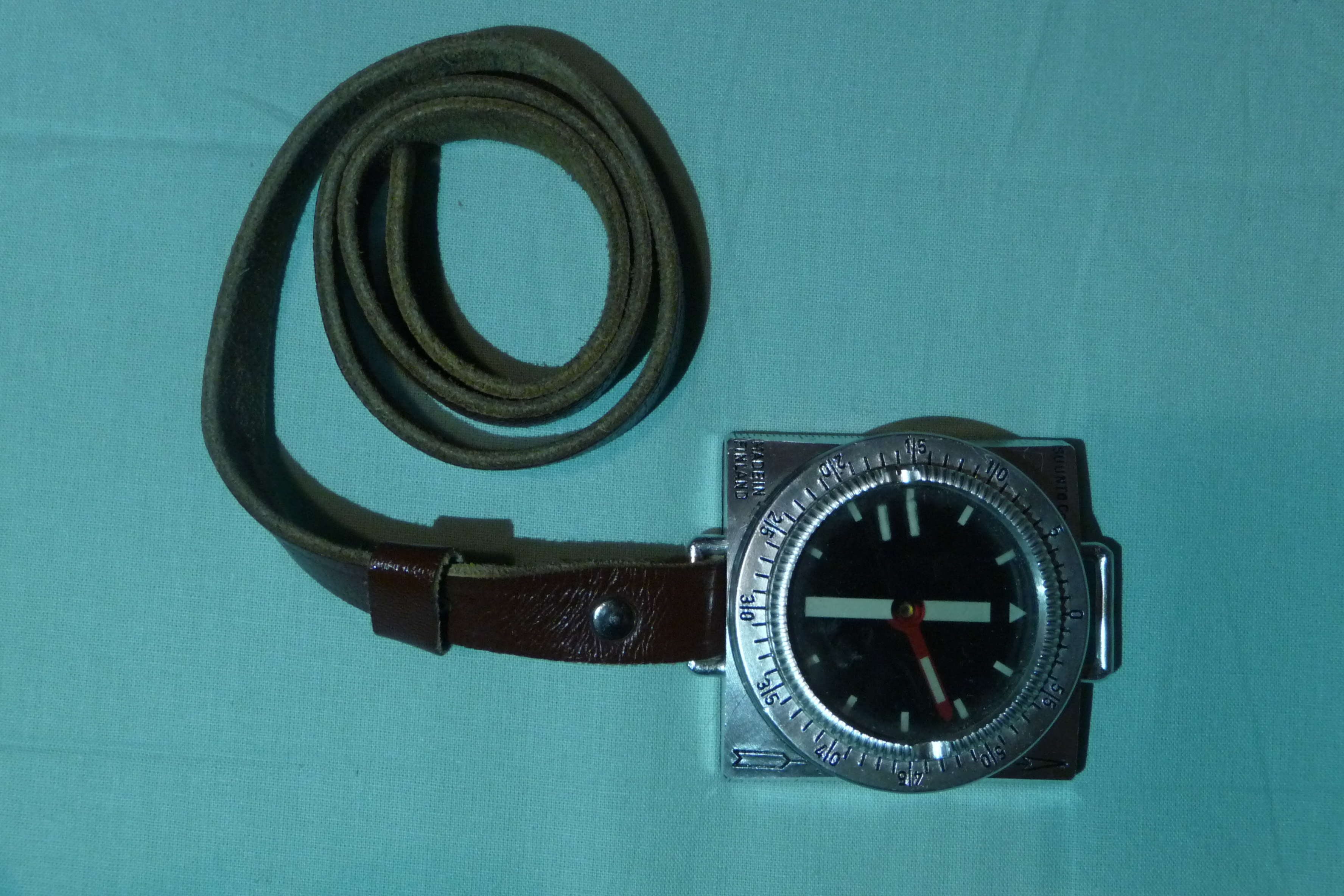 Kuva marssikompassista.